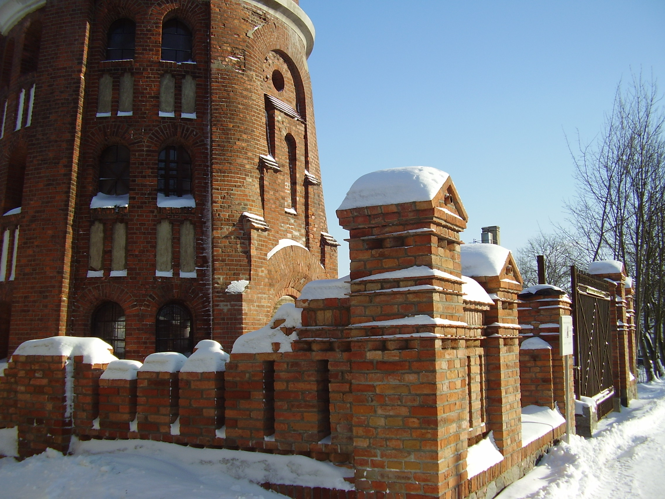 Morąg. Wieża ciśnień przy ul. Dąbrowskiego (zabytek nr rejestr. A-1952)